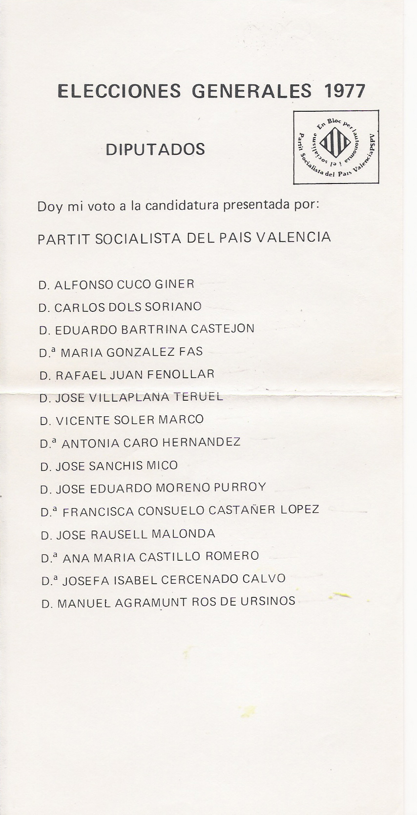 Papeleta del Partit Socialista del País Valencià al Congreso por Valencia en 1977.